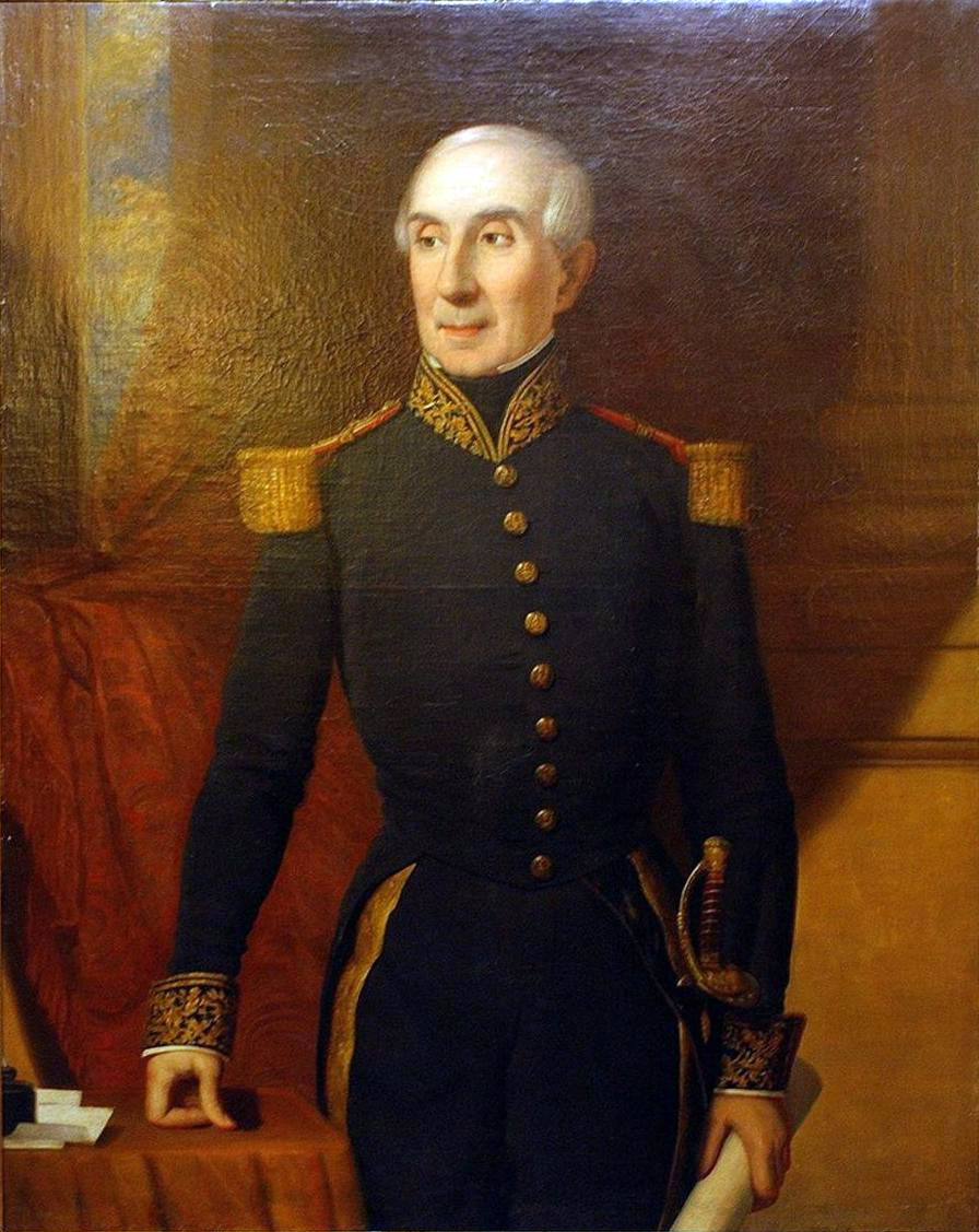 Manuel Blanco Encalada (Buenos Aires, 21 de abril de 1790 — Santiago, 5 de septiembre de 1876), almirante chileno, de origen rioplatense, primer Presidente de la República.